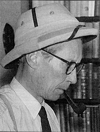 Suomalainen kirjailija-toimittaja Aarne "Outsider" Haapakoski (1904-1961)